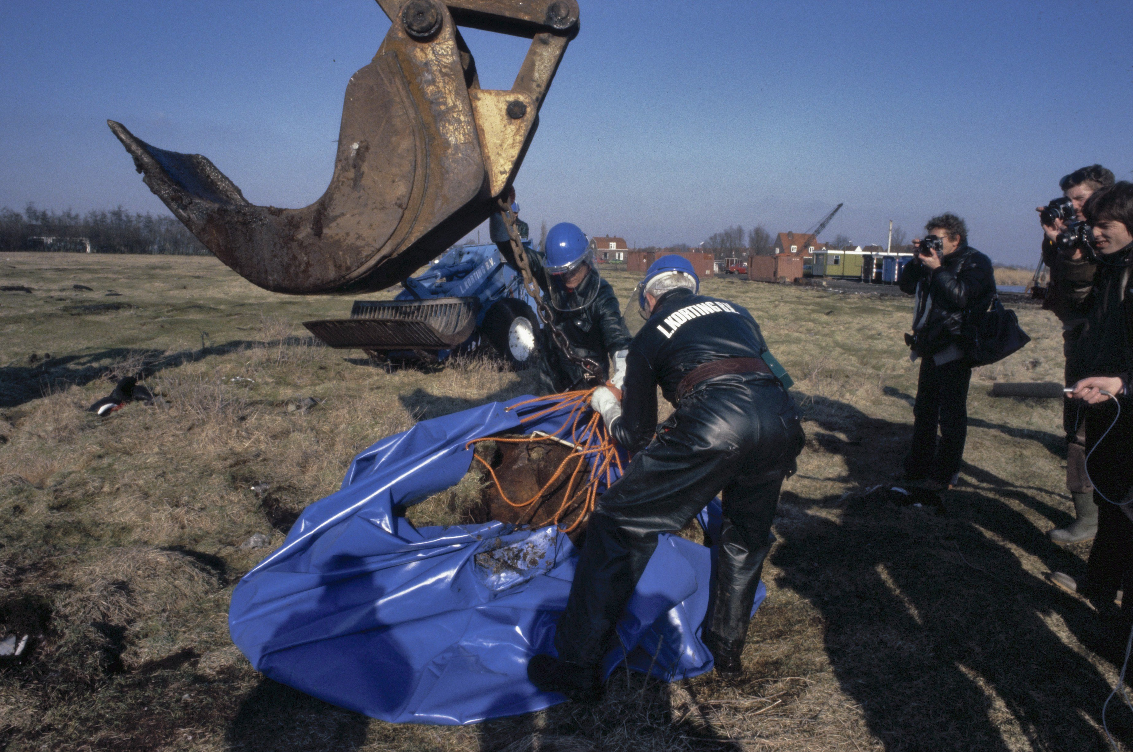 Eerste fase zogenaamde "uitlepelplan" in Vogelmeer polder besmette grond en vaten worden in plastic verpakt